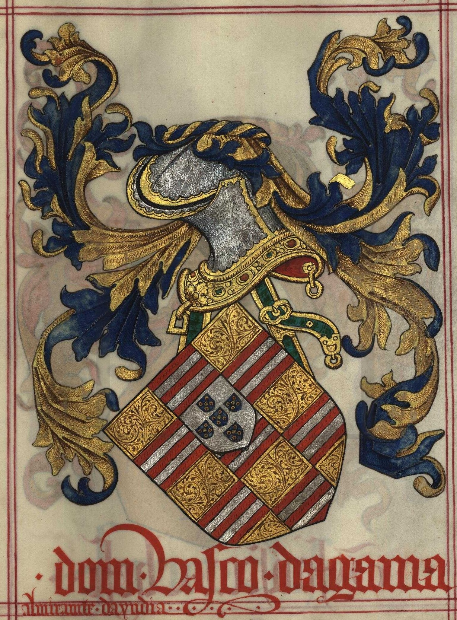 Armas de Vasco da Gama, Almirante da Índia in Livro do Armeiro-Mor (fl 87) Armas dos condes da Vidigueira e marqueses de Nisa